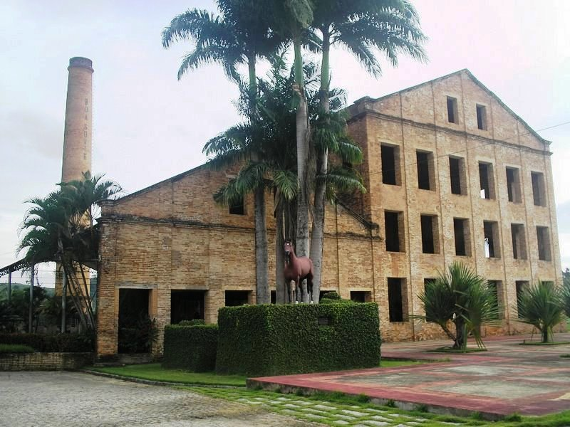 Haras Boa Sorte viçosa alagoas